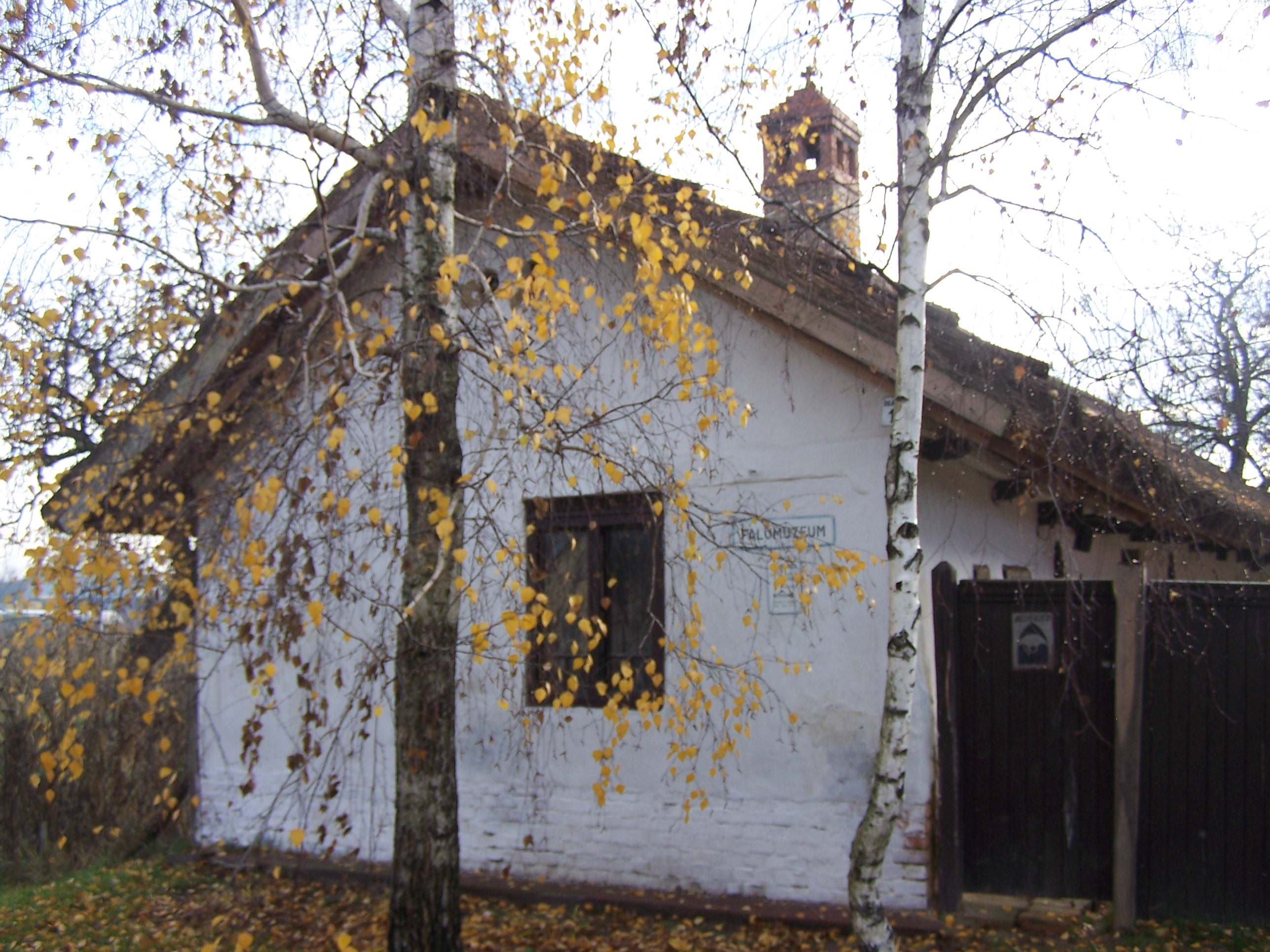 Lakóépület (Falumúzeum) (Dány, Deák krt. 10.)